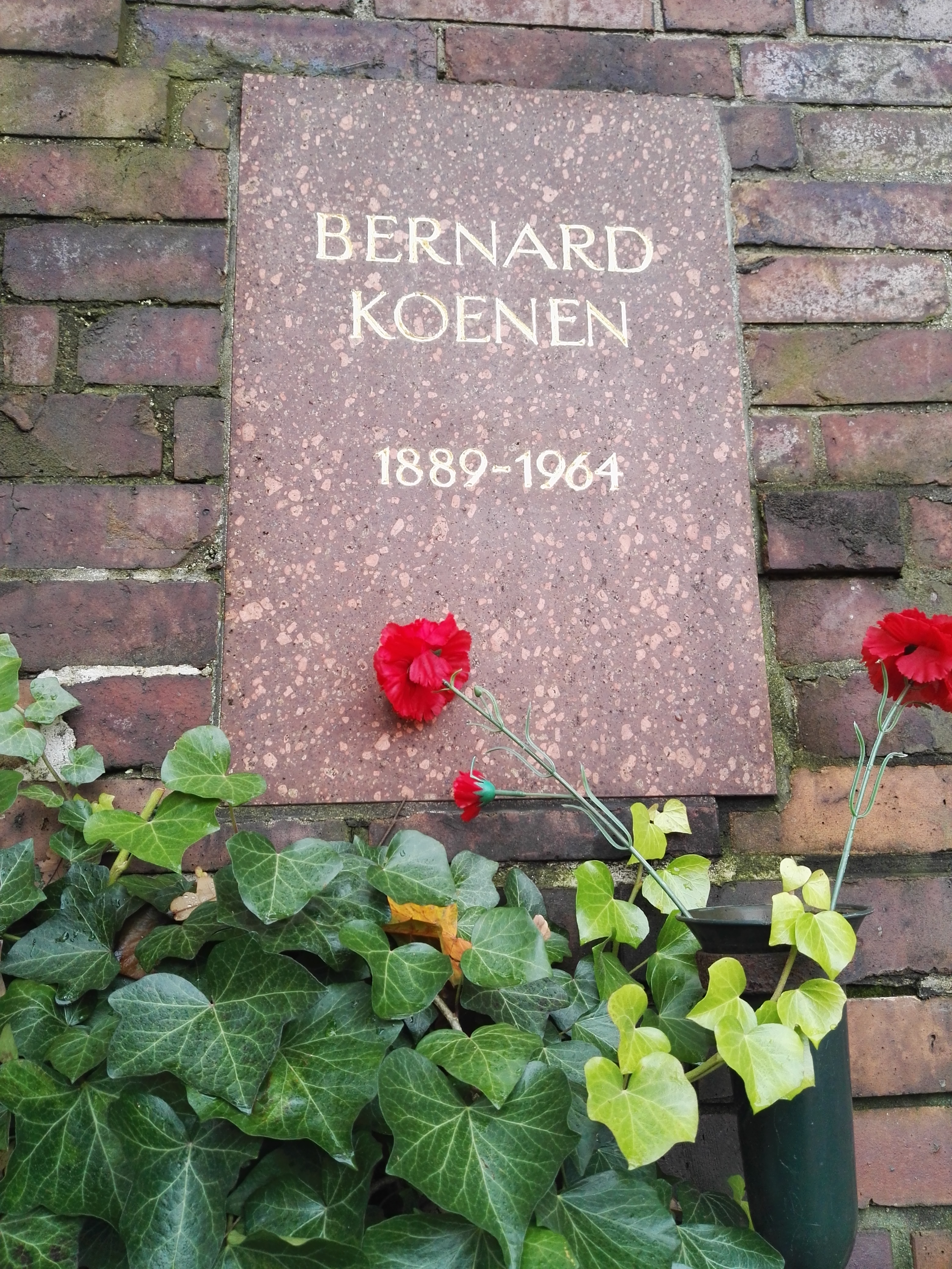 Grab von Bernard Koenen in der Gedenkstätte der Sozialisten auf dem Zentralfriedhof Friedrichsfelde in Berlin-Lichtenberg